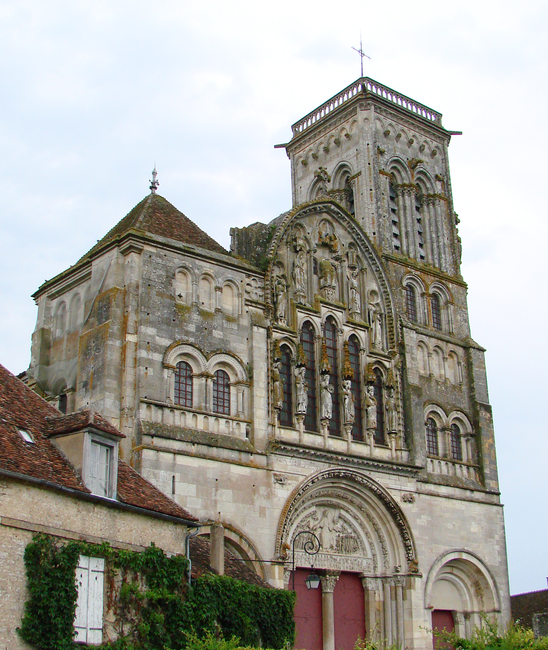 Façade de la basilique Sainte-Marie-Madeleine de Vézelay.